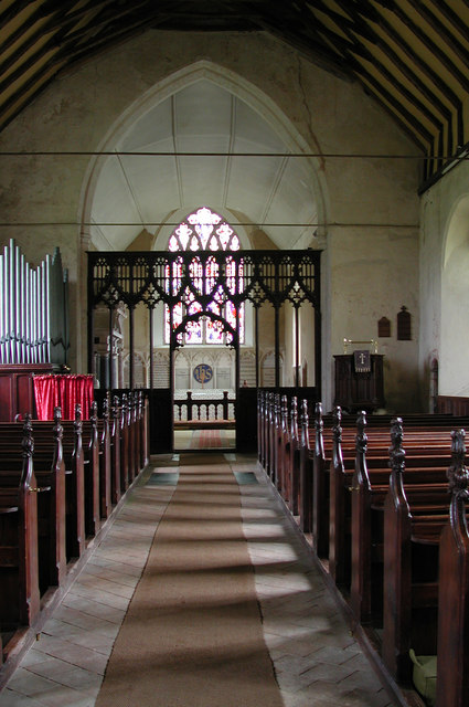 St Margaret, Paston, Norfolk - East end